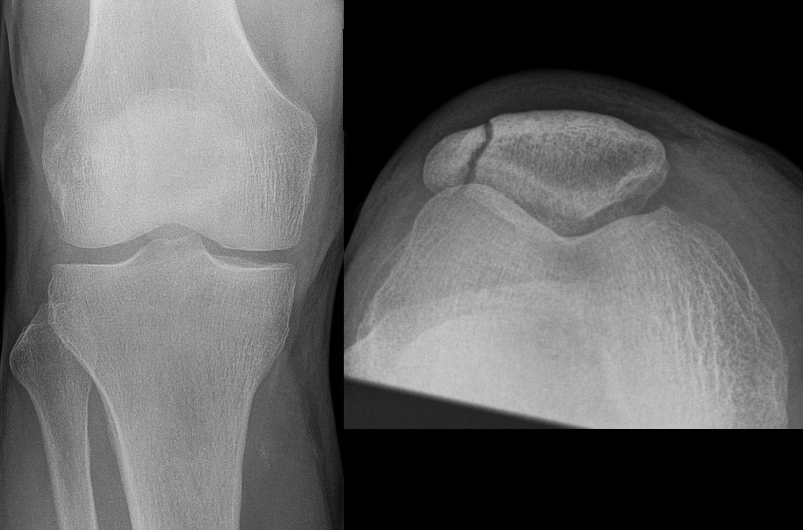 Patellafraktur längs im Röntgenbild frontal und tangential